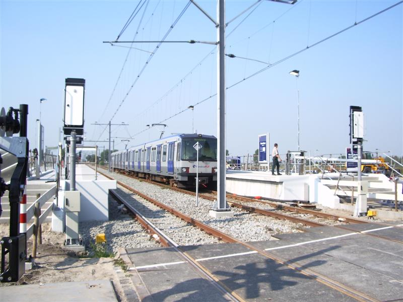 Station Nootdorp aan de Hofpleinlijn, een dag na de opening.